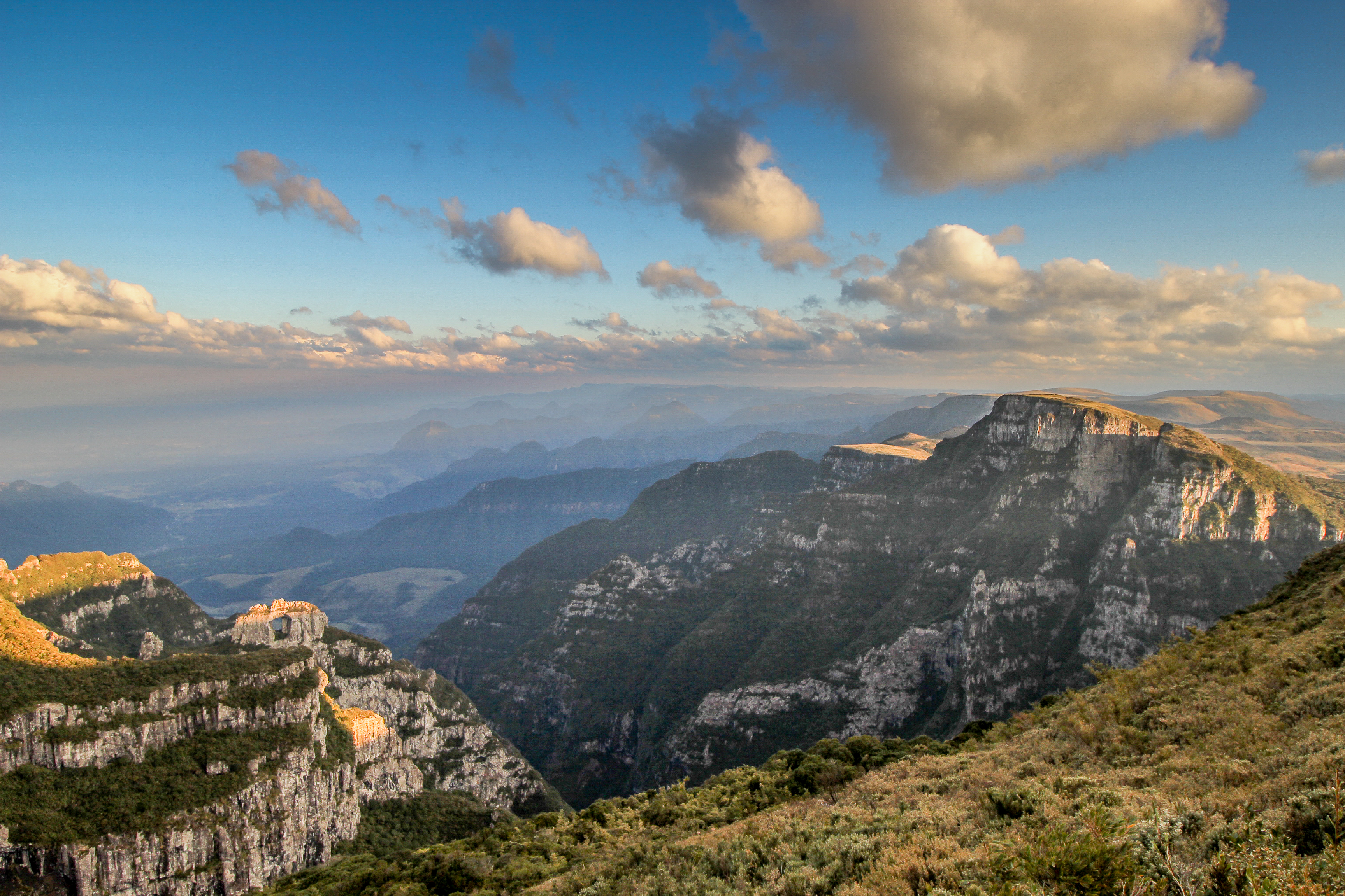 Urubici- SC